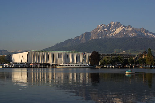 Verhülltes KKL und Pilatus (Luzern) (Nr. 03.1-4660)